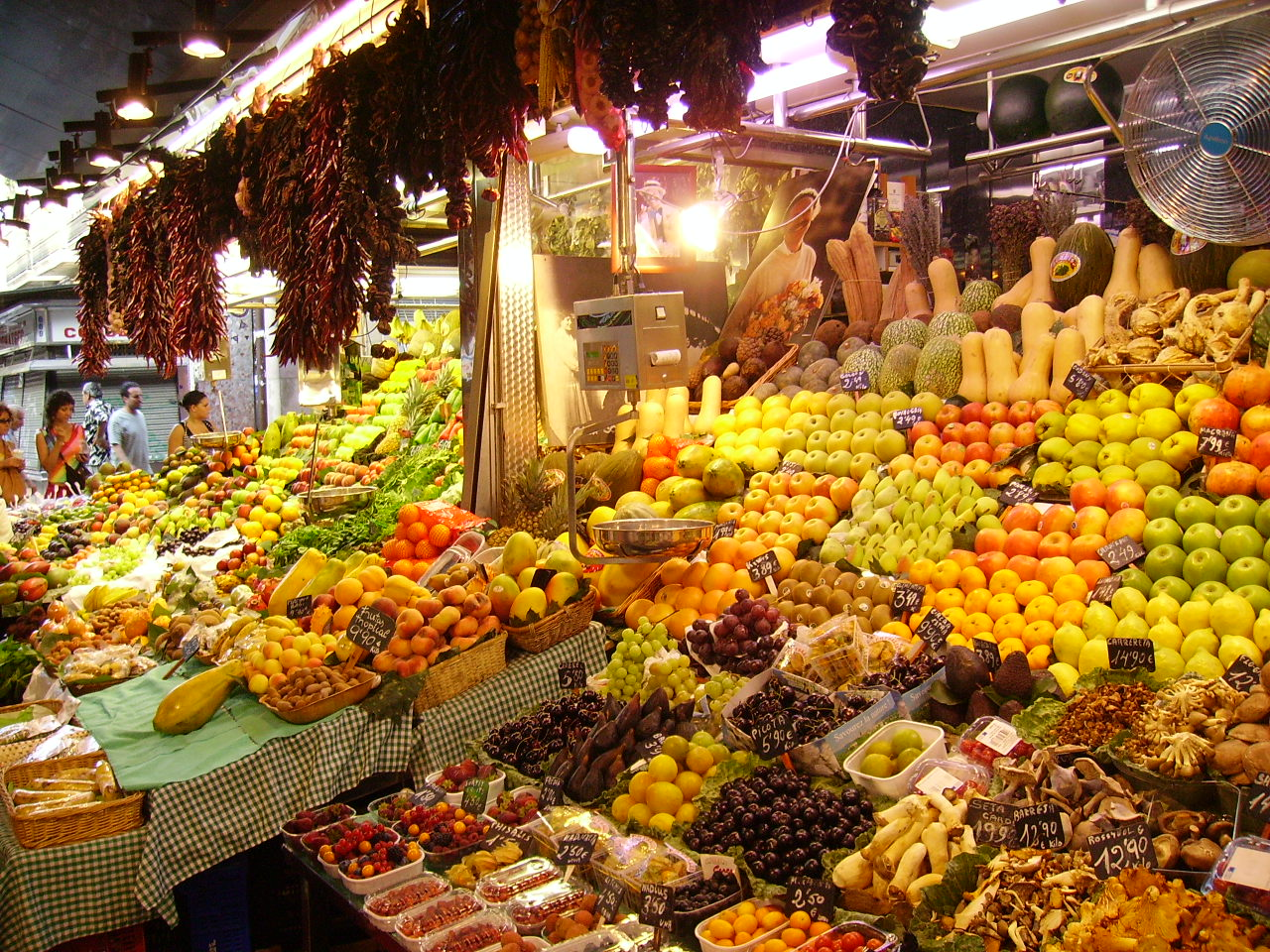 Barcelona, Mercat de la Boquería. Photoshot taken by me